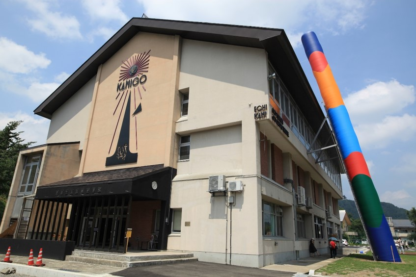 上郷クローブ座の外観。